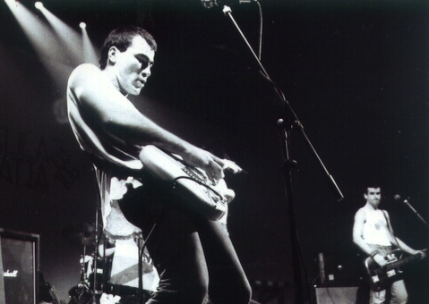 M.C.D. en Irún.